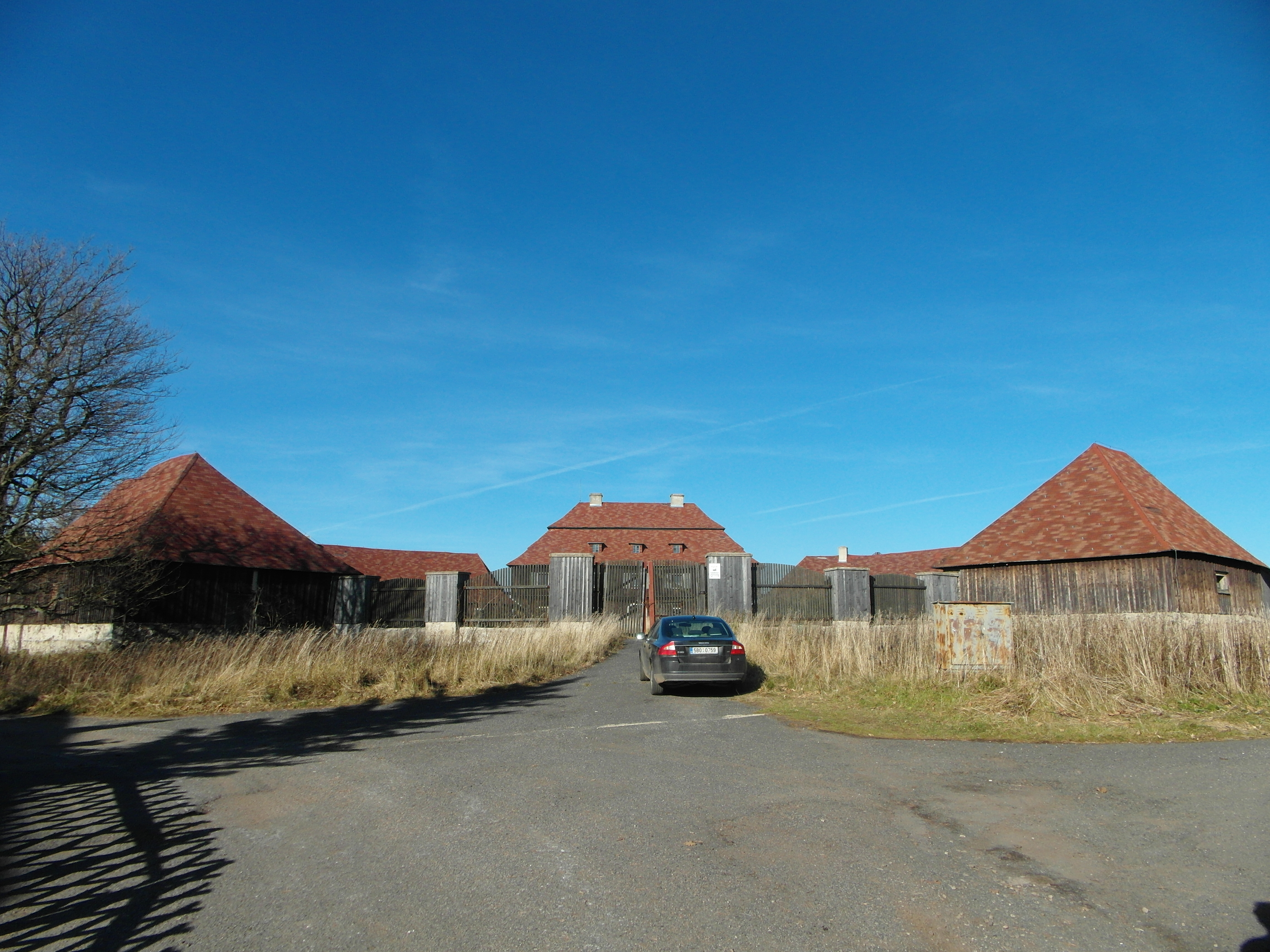 Vorderansicht